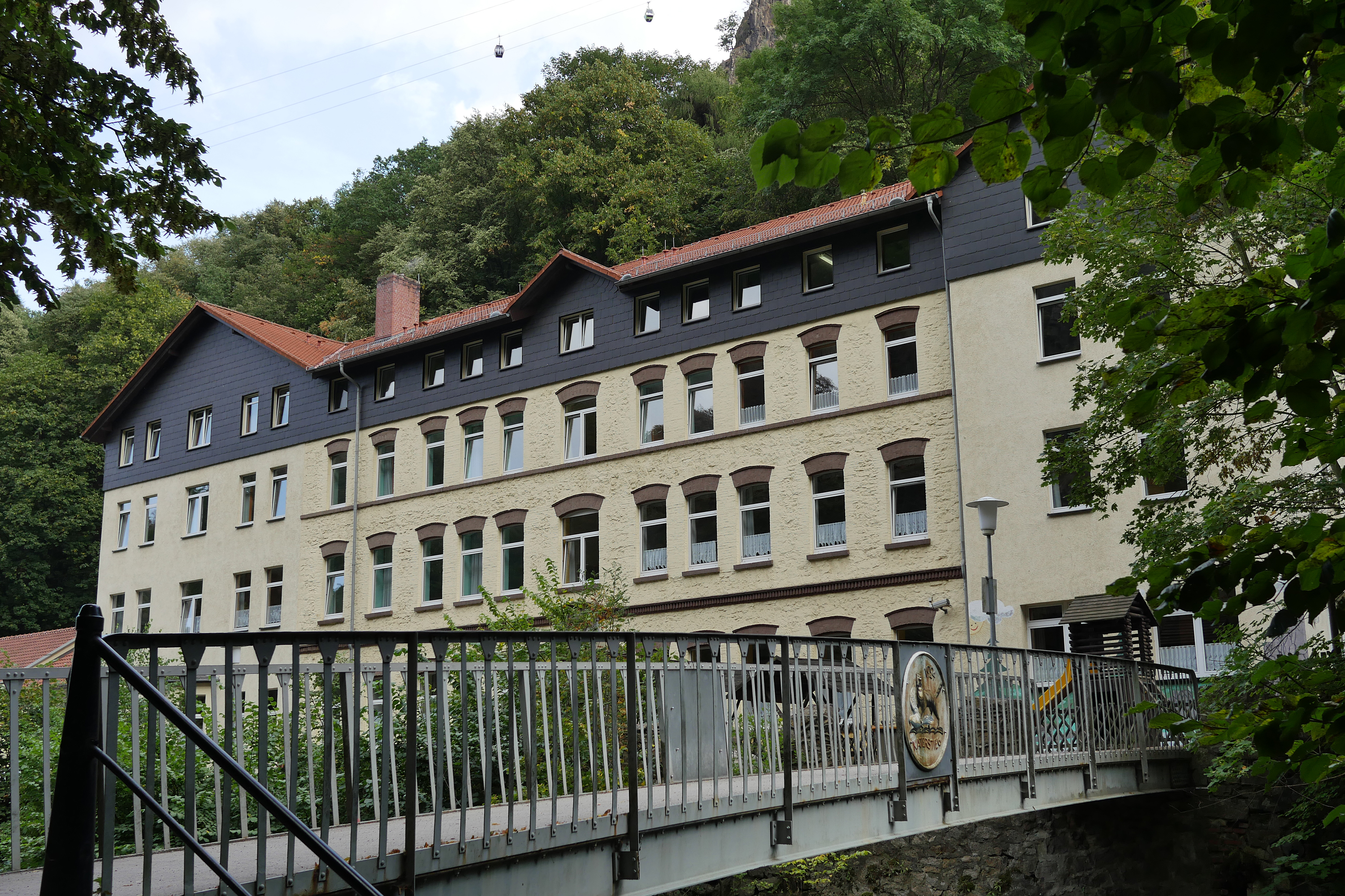 Im ehemaligen Hotel Waldkater befindet sich eine Jugendherberge, im Vordergrund die Katerbrücke über die Bode